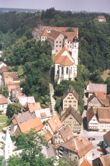 author: vux description: Schlosskirche und Schloss Haigerloch in Haigerloch, Baden-Württemberg, Germany